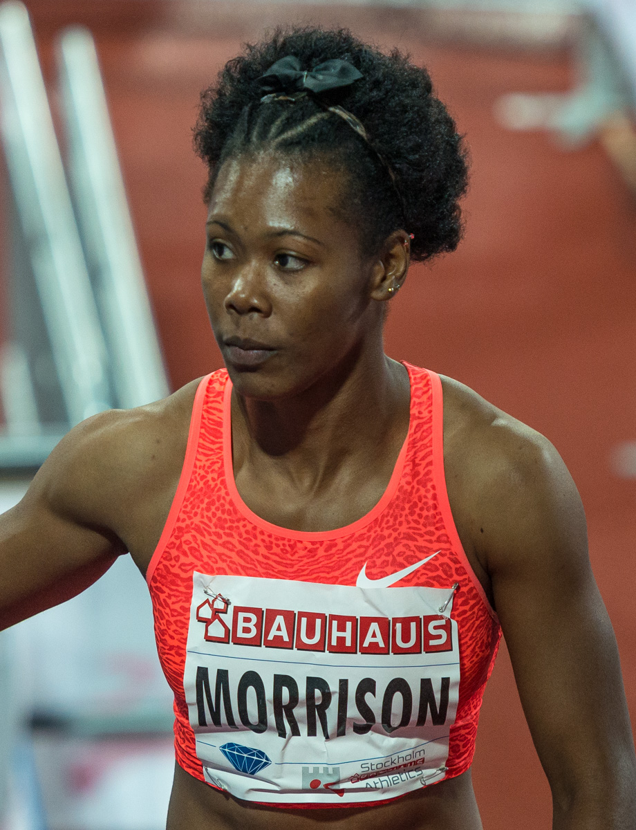 Natasha Morrison på IAAF Diamond League-/Bauhaus-Galan på Stadion i Stockholm i juli 2015.